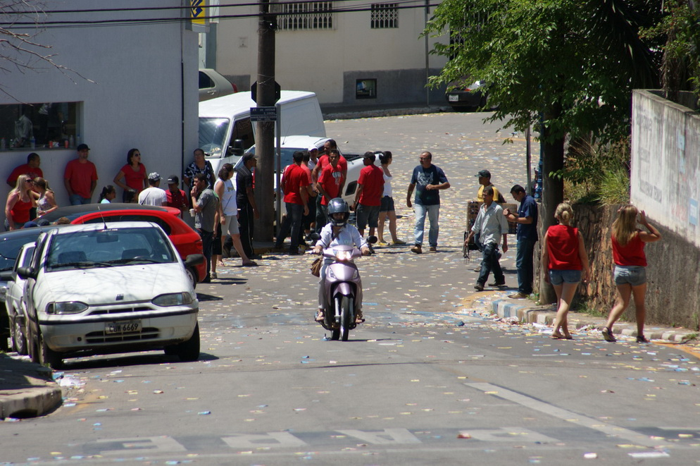 Imagem do município de Jarinu, estado de São Paulo, Brasil.